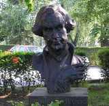 Bista Ruđera Boškovića u dvorištu istoimene škole.